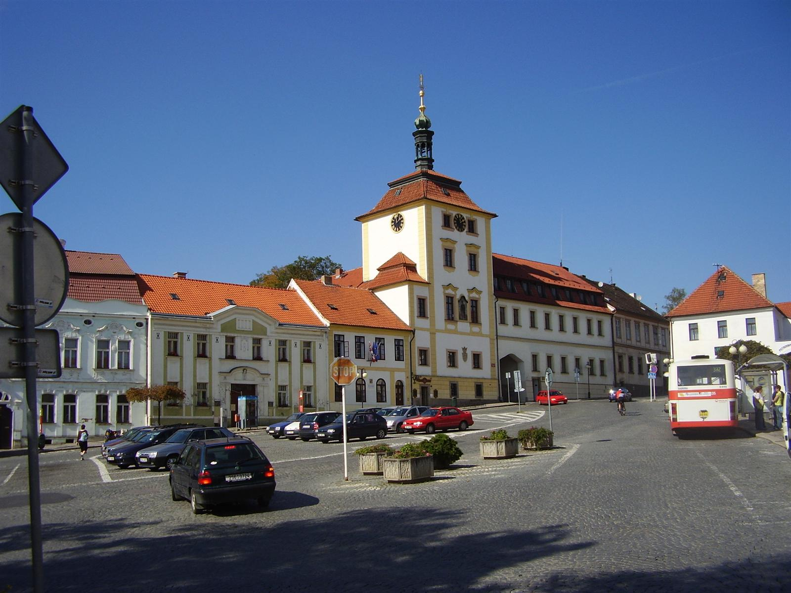 Česky: Náměstí v Jílovém u Prahy s radnicí